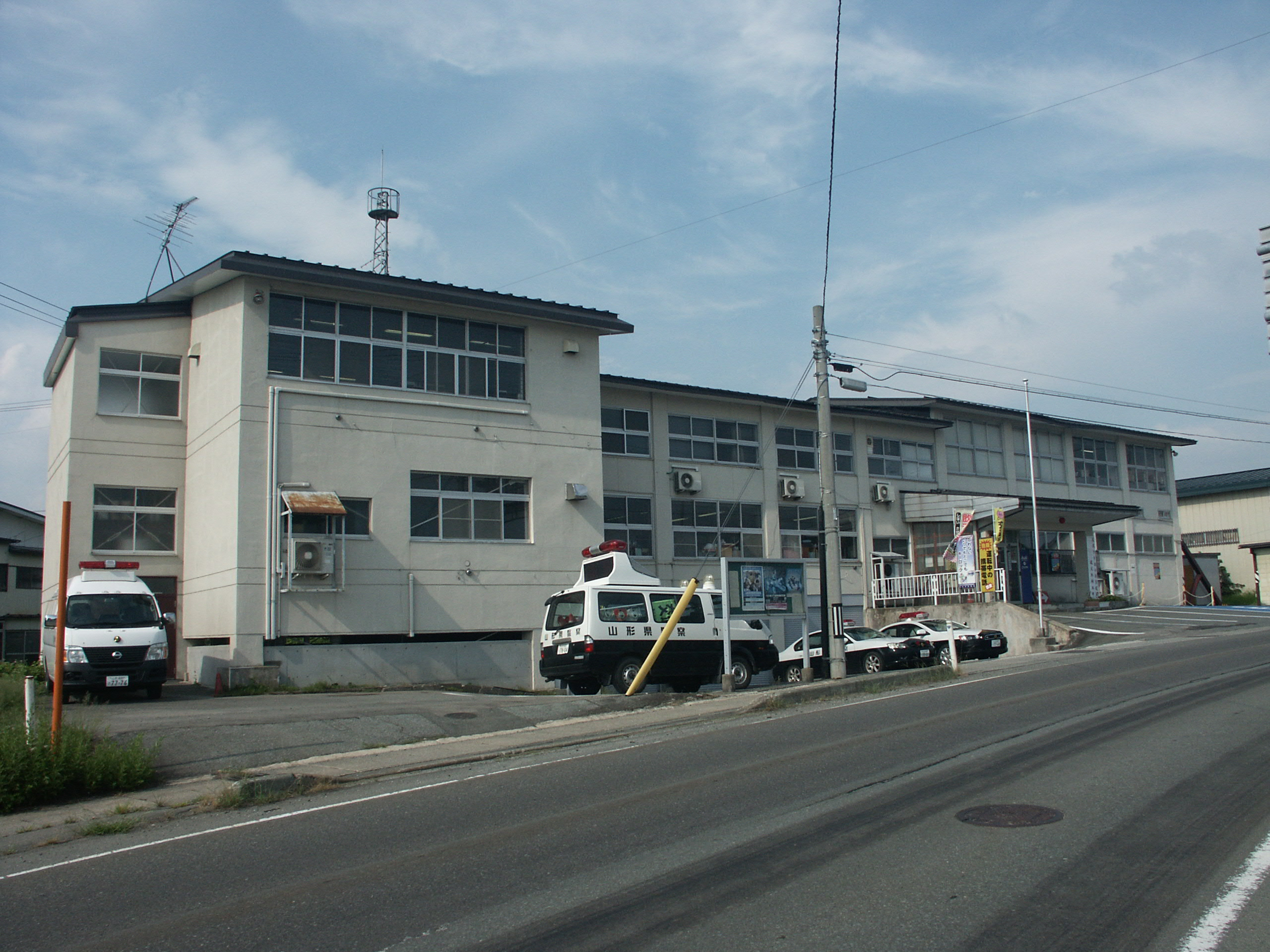 山形県尾花沢警察署庁舎（西側から撮影）